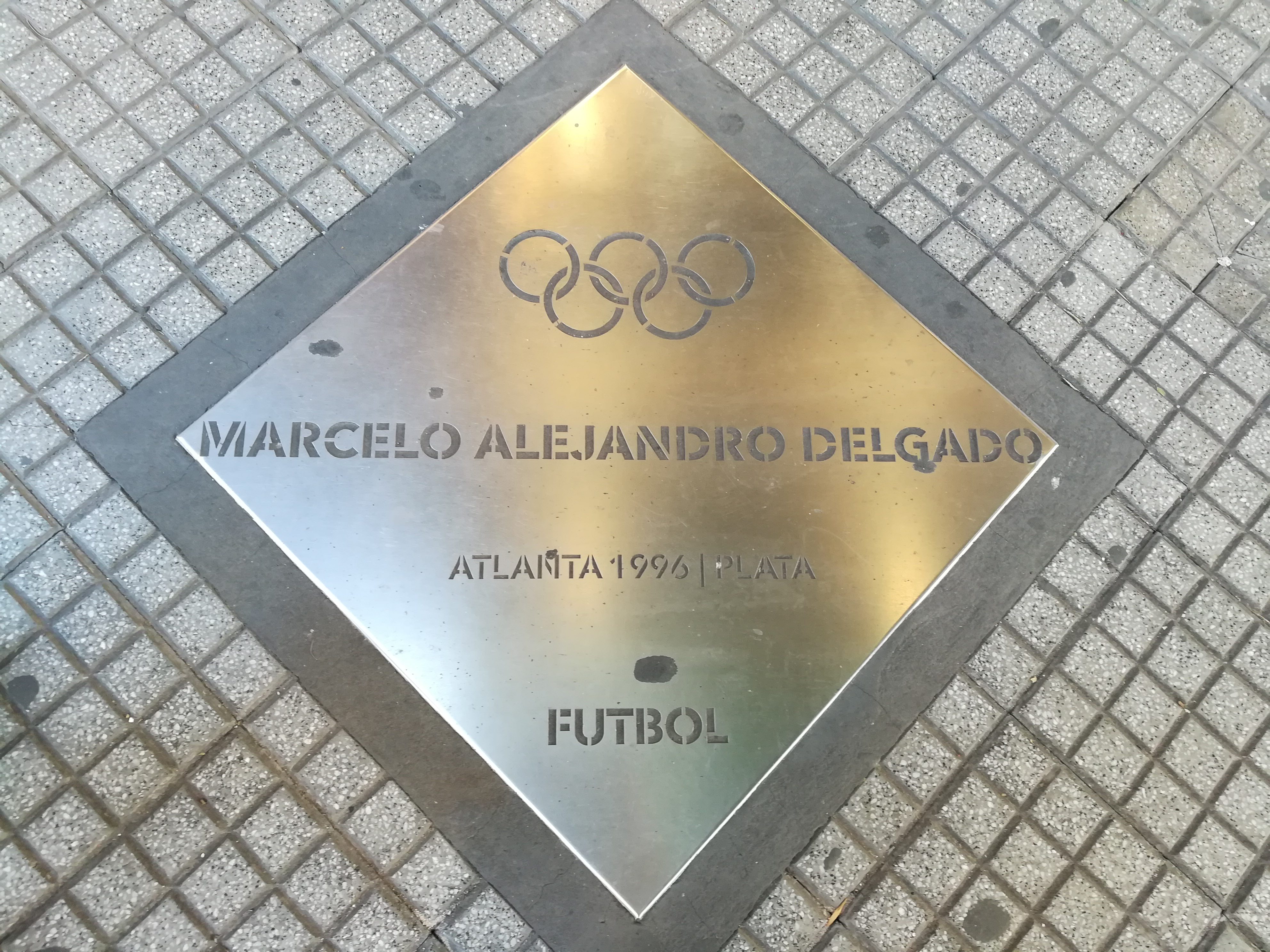 Paseo de los Olímpicos de los en la Avenida Pellegrini (Rosario).